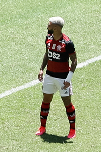 (Brasília - DF, 16/02/2020) Jogo Flamengo x Atlético PR. Foto: Carolina Antunes/PR